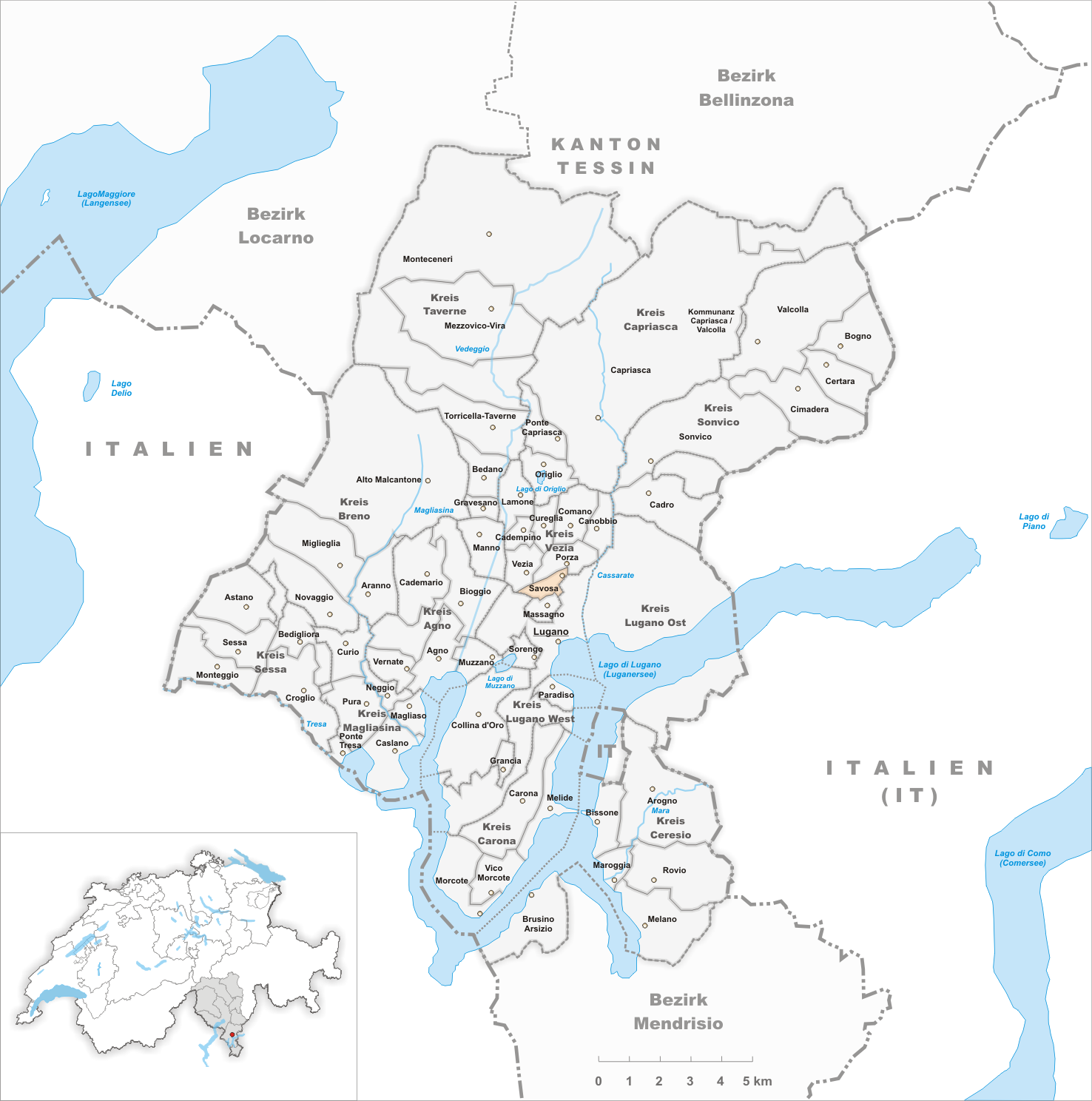 Municipality Savosa